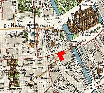 Lage des Werderhauses in Berlin, 1905.